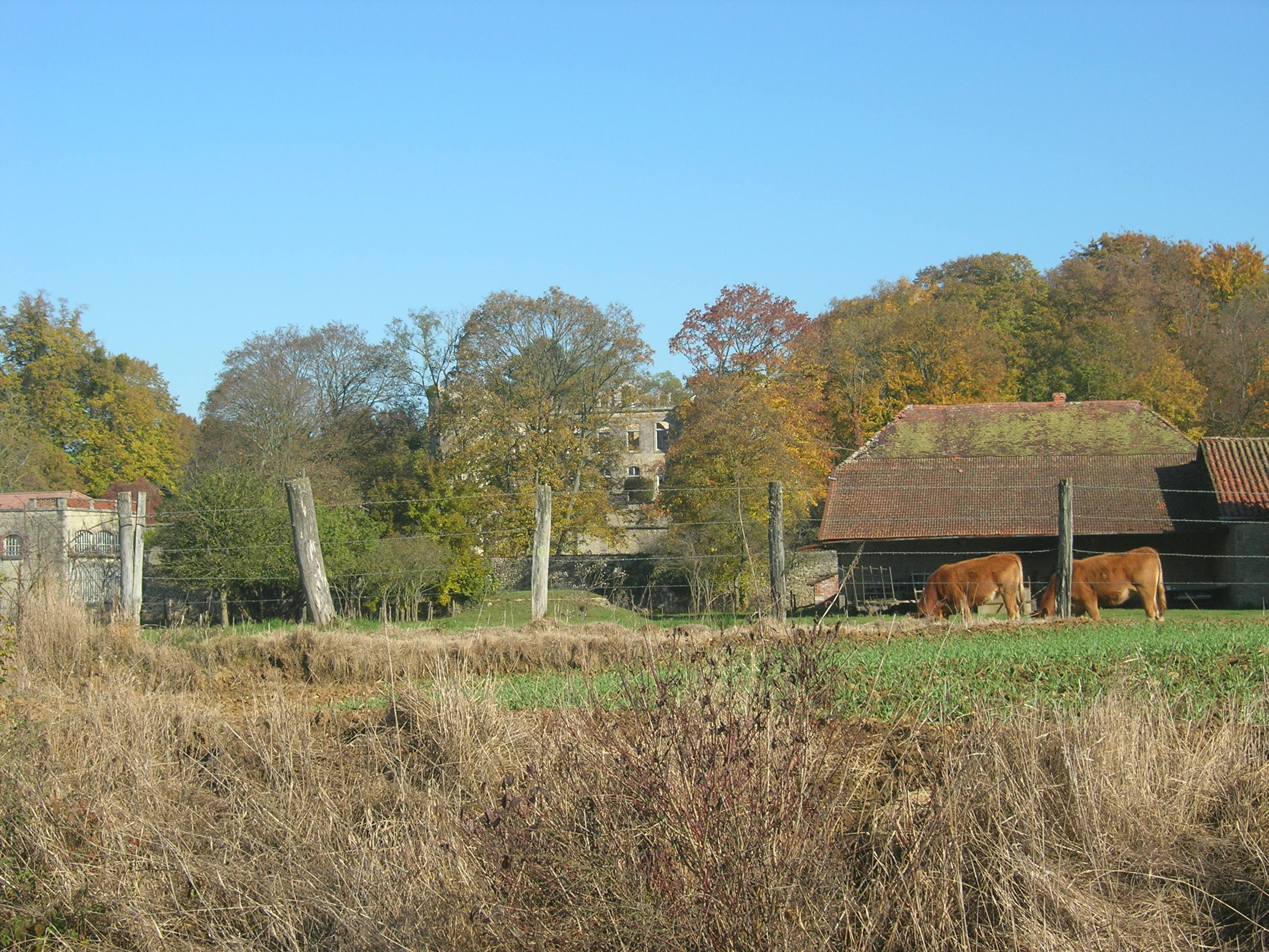 Exploitation Bovine devant le château de Trémilly